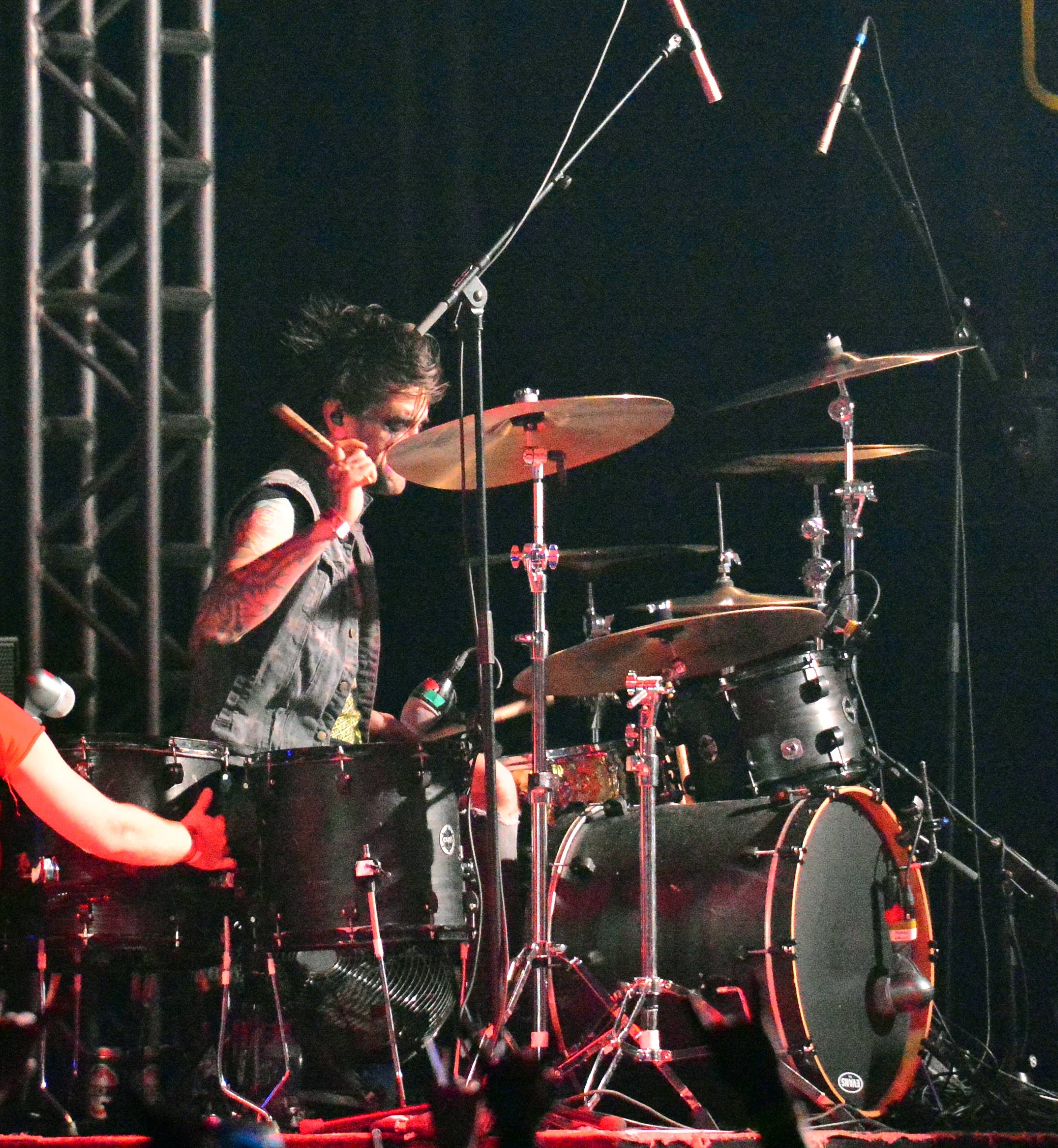 Combichrist beim Wacken Open Air 2015